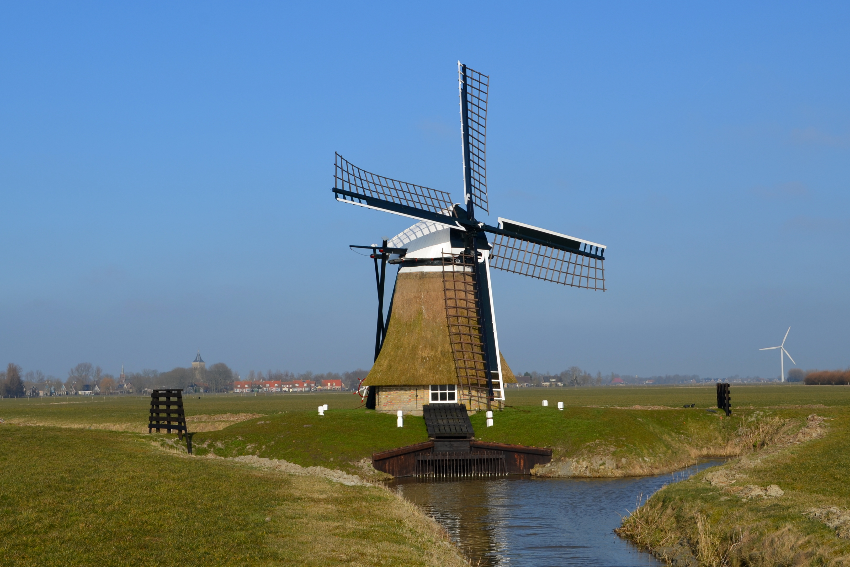 Rispenserpoldermolen, Trijehuzen, Hidaard met op de achtergrond het dorp Easterein